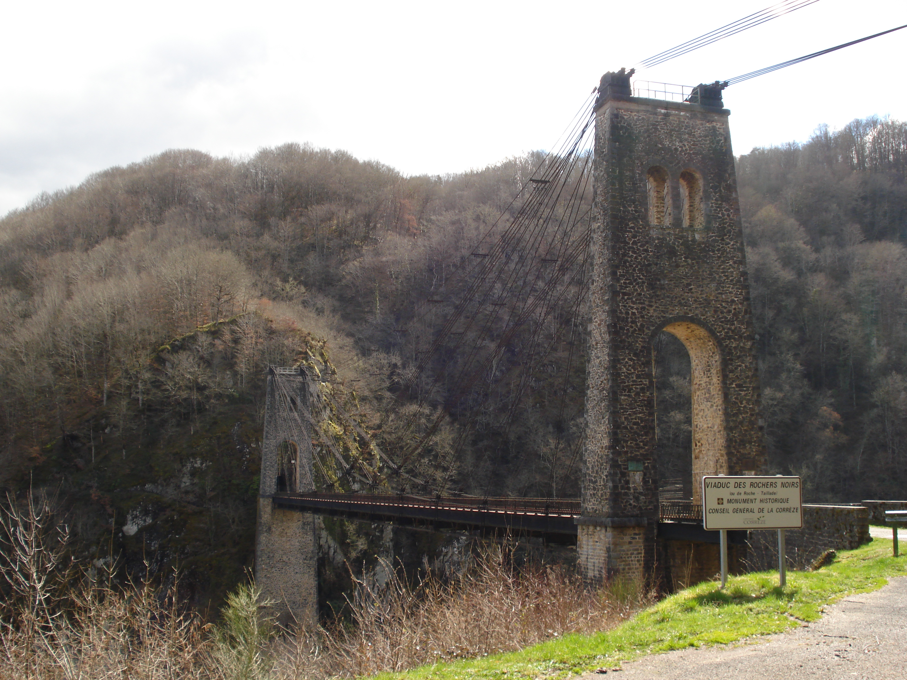 Le viaduc des Rochers Noirs coté Lapleau en Corrèze